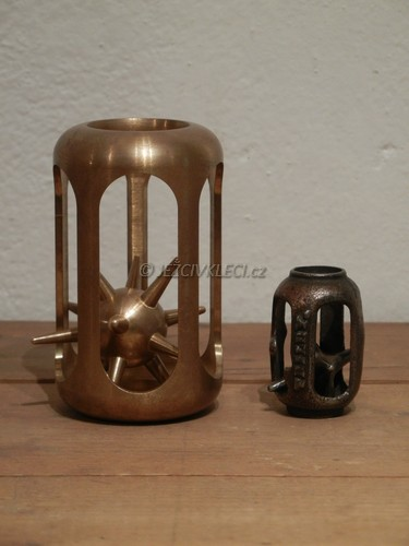 Ježek v kleci z roku 1886 v porovnání se šroubovacím Ježkem ORIGINAL z roku 2013